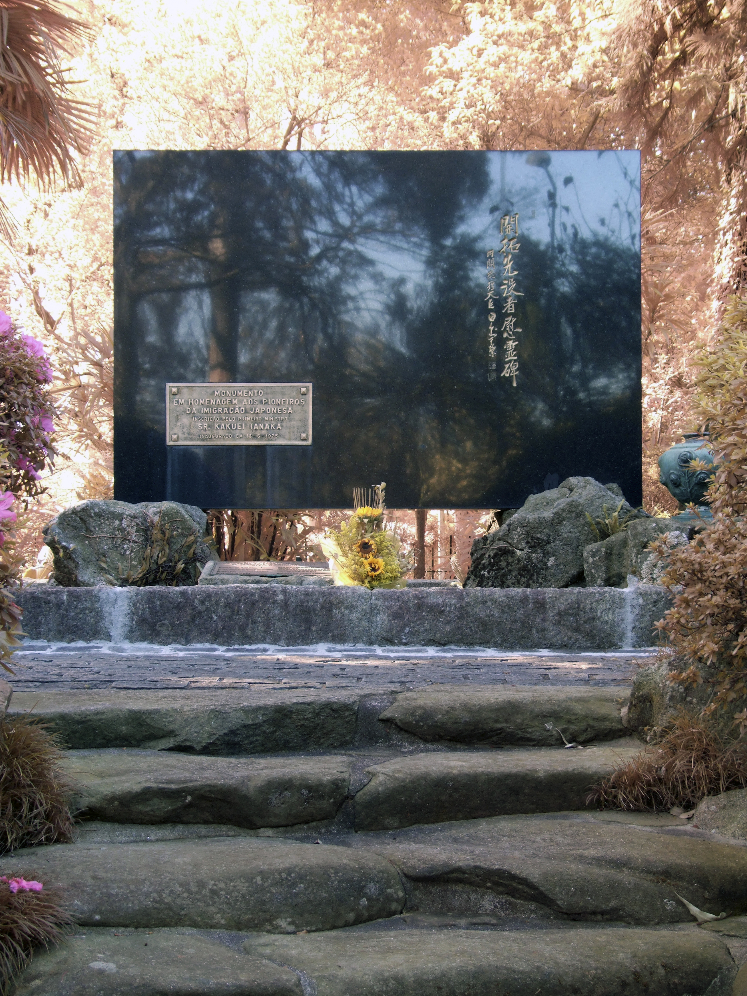 Monumento em Homenagem aos Pioneiros da Imigração Japonesa, Parque do Ibirapuera, Brasil Inscrição pelo Primeiro Ministro Sr Kakuei Tanaka, inaugurado 18 - 06 - 1975